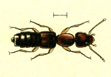 Scopaeus rubidus